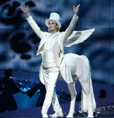 Aleksandar Josipović na Pesmi Evrovizije 2008., kao master of ceremony . autor: Gofzamen